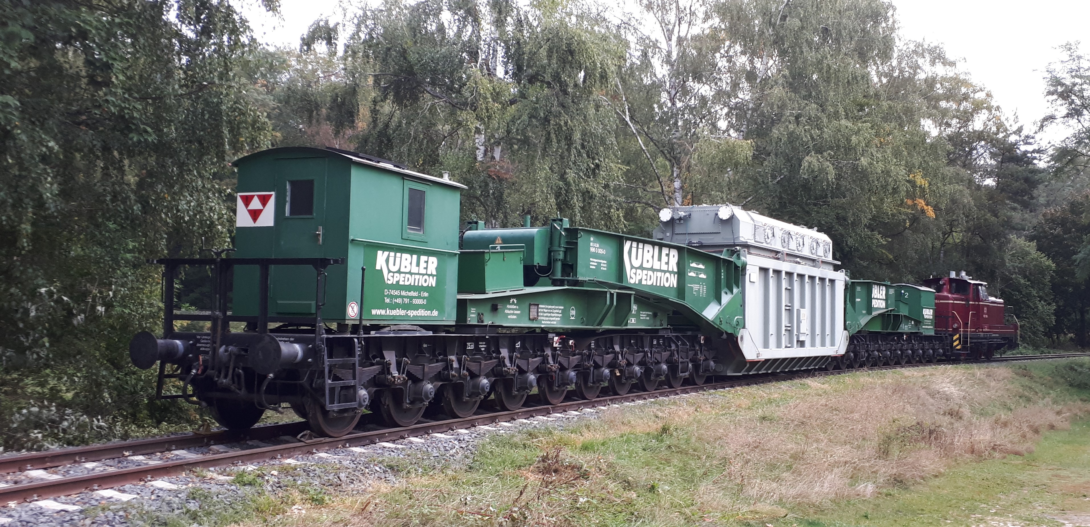 V60 1184 der Vulkan-Eifel-Bahn Betriebsgesellschaft mbH (VEB) an der Awanst RWE (Dreieichbahn zwischen Rödermark Urberach und Offenthal) mit einem Trafo Sonderzug der Spedition Kübler.